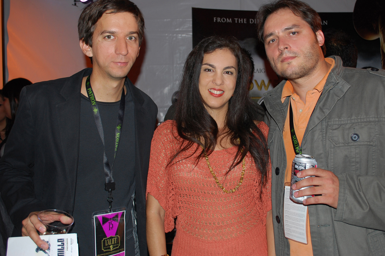 Matías Bize, Jackie Di Crystal, y Javier B en el Festival de Cine LALIFF en el cual Matías gano el premio de mejor Director.